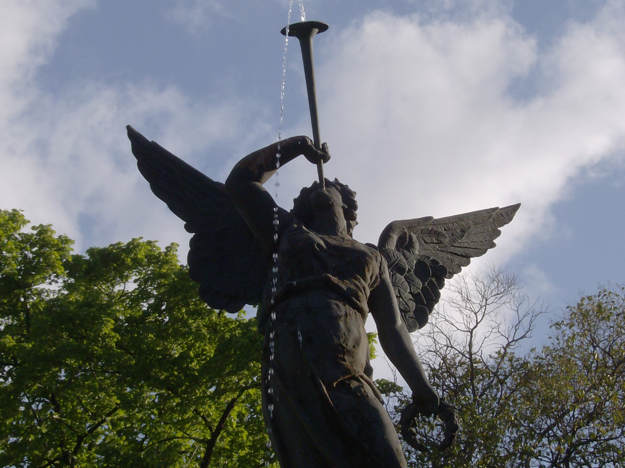 Fuente de la Fama, Campo Grande de Valladolid.